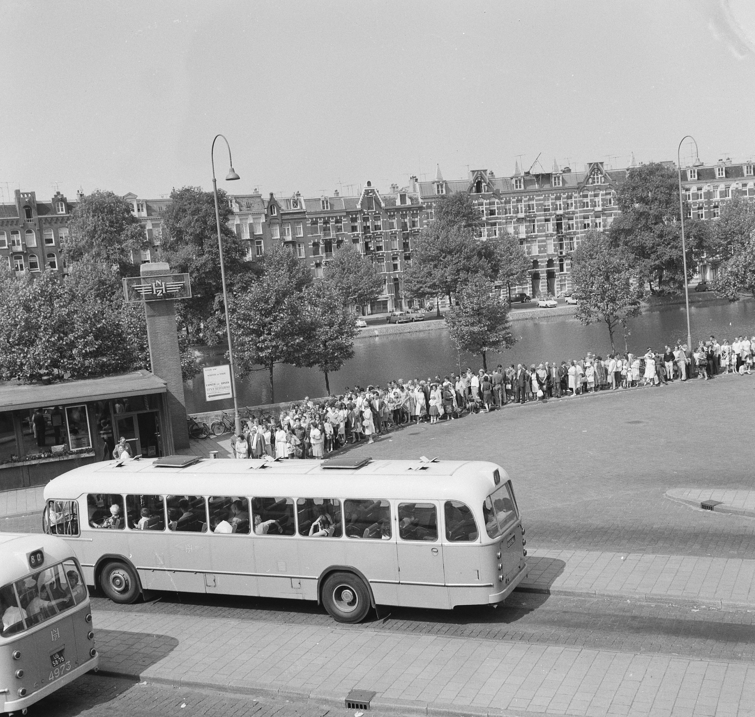 Collectie / Archief : Fotocollectie Anefo Reportage / Serie : [ onbekend ] Beschrijving : Amsterdammers wachten op bus naar Zandvoort op Elandsgracht Datum : 31 mei 1964 Locatie : Amsterdam, Noord-Holland Trefwoorden : Amsterdammers Fotograaf : Nijs, Jac. de / Anefo Auteursrechthebbende : Nationaal Archief Materiaalsoort : Negatief (zwart/wit) Nummer archiefinventaris : bekijk toegang 2.24.01.03 Bestanddeelnummer : 916-4939